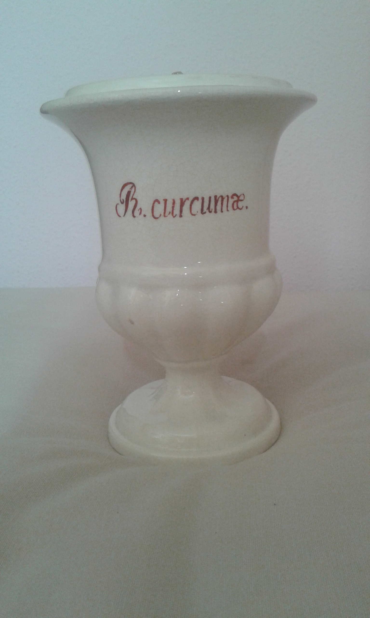 Farmacopea empleada para almacenar ingredientes con propiedades curativas, los cuales eran usados en la elaboración de los remedios para enfermos en las farmacias, antes de la consolidación de la industria farmacéutica en el s.XX. Colección privada.